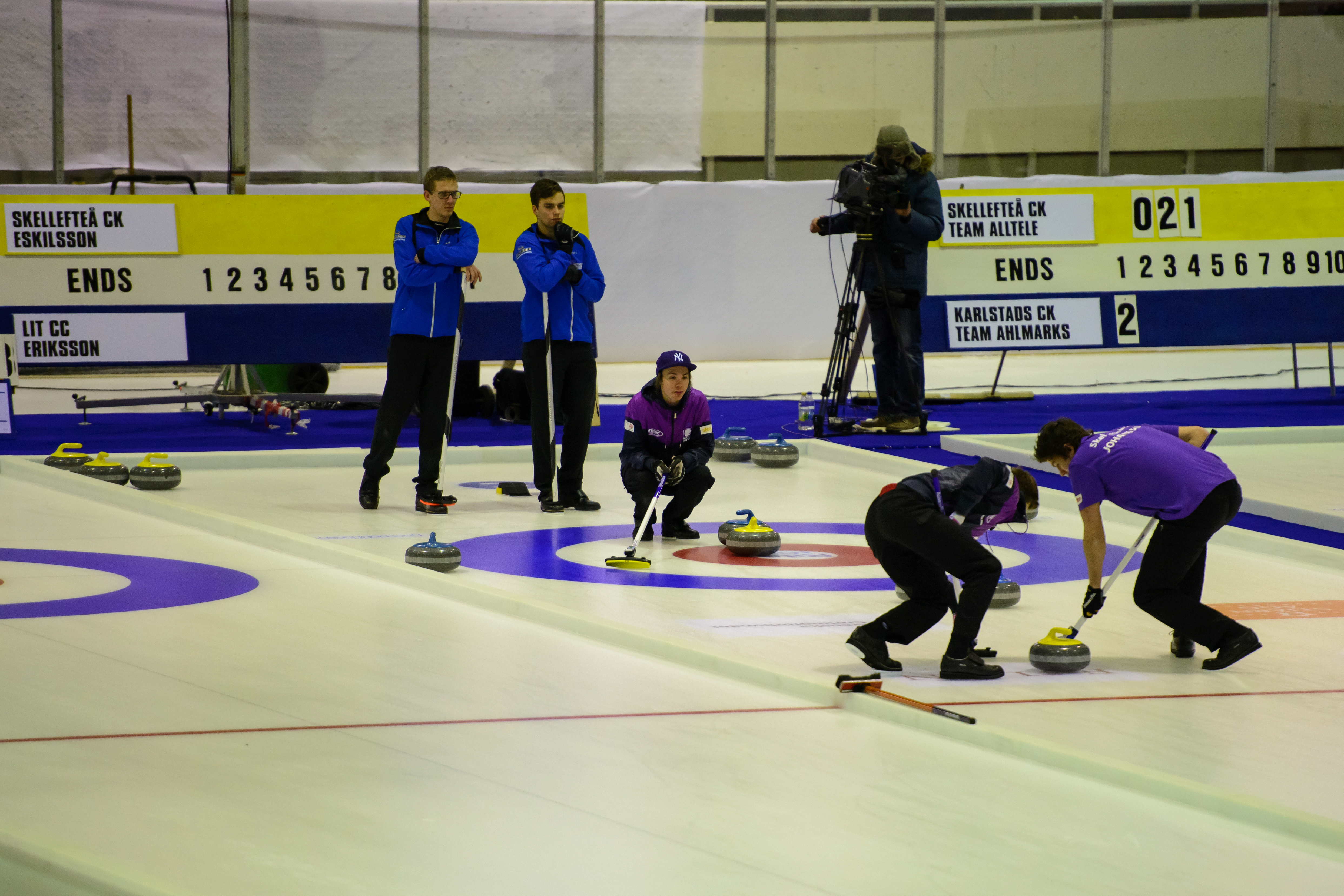 SM-final i curling, herrar, 2013: Skellefteå CK mot Lit CC. Lit CC vann med 8–7.